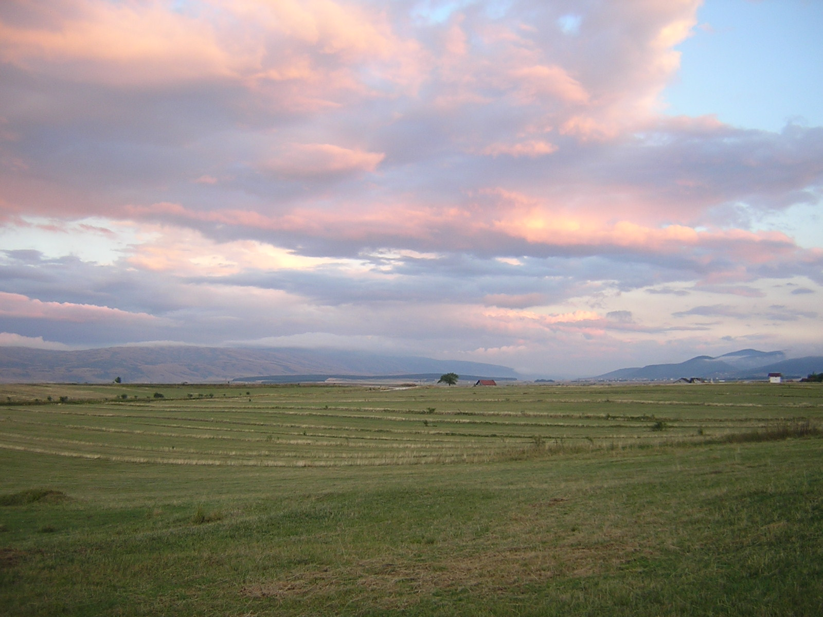 Glamočko polje